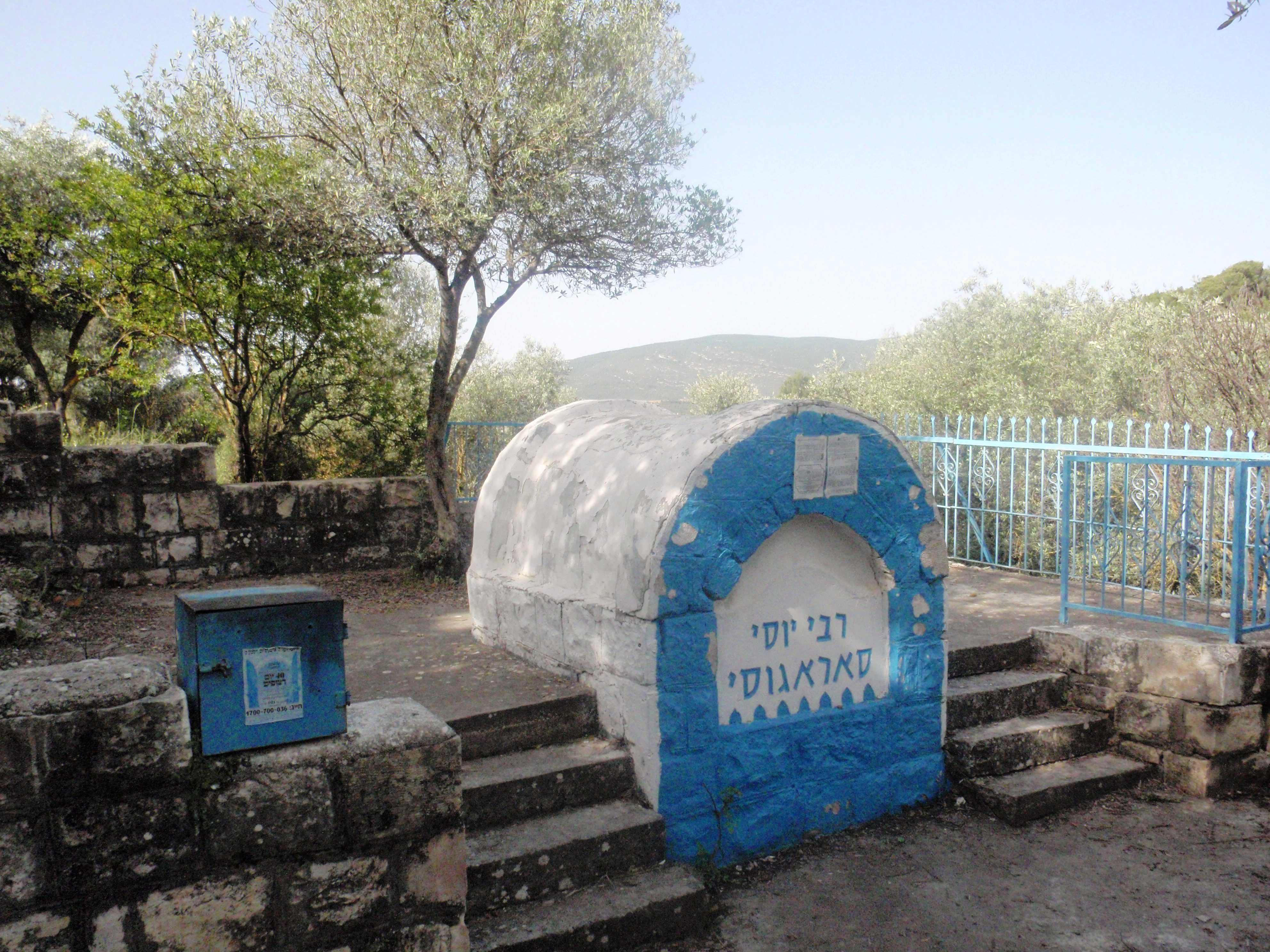 קבר רבי יוסי סרגוסי